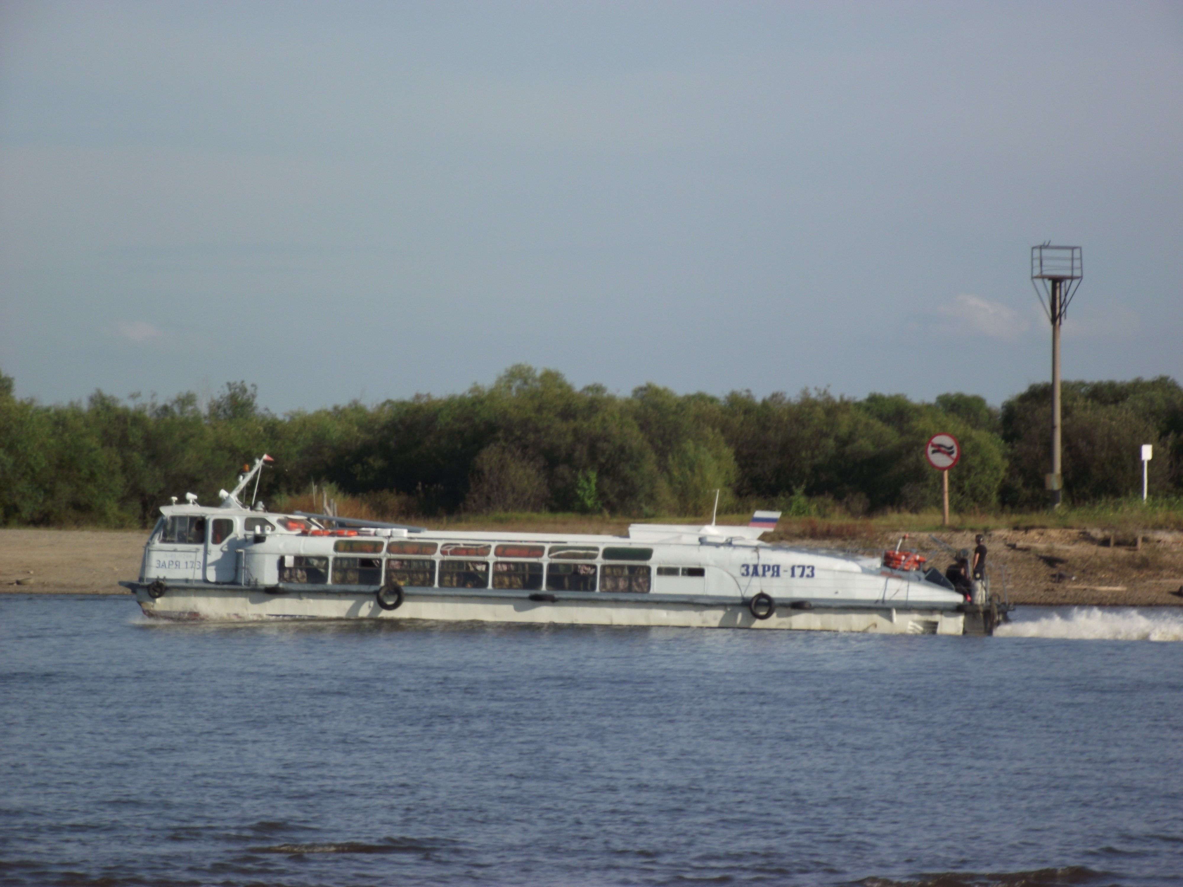 Zarya-173 (ship, 1975)